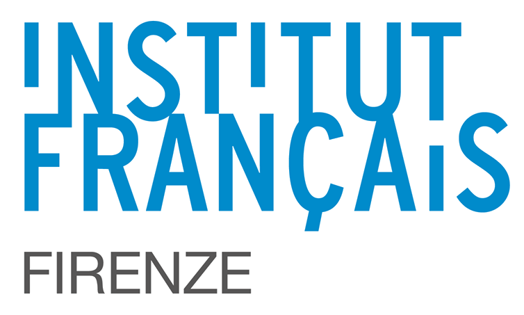 Le logo officiel de l'Institut français de Florence dont le nom officiel depuis 2012 est "Institut français Firenze"